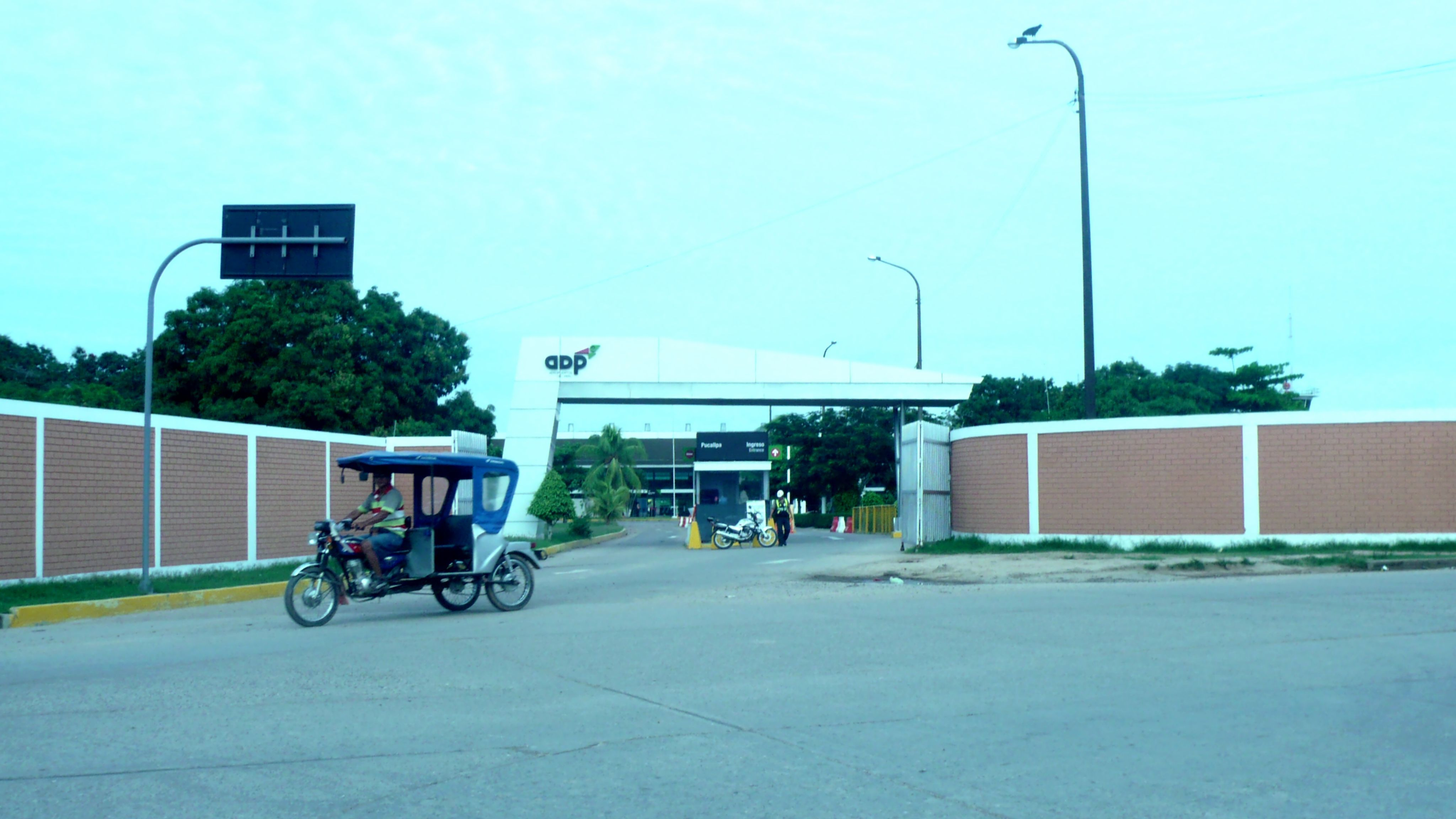 Entrada del aeropuerto de Pucallpa, dondeal frente se ve la oficina del lugar.